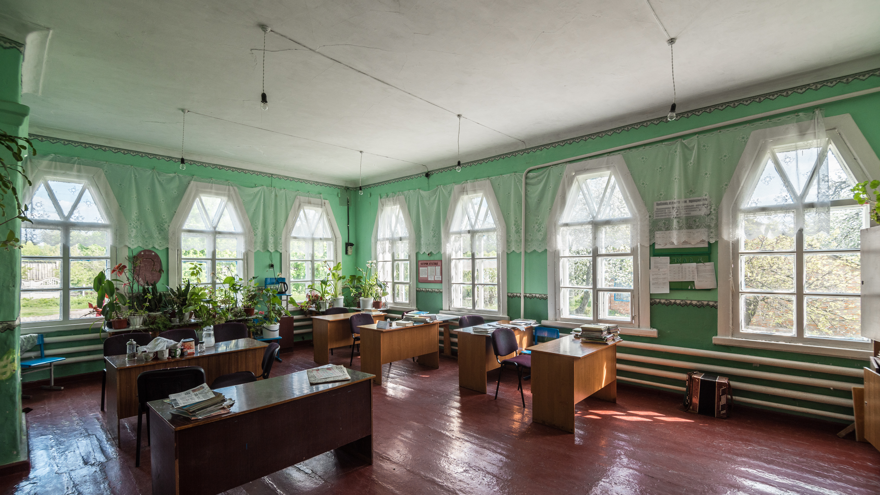 Двокомплектна земська школа в селі Богодарівка Чорнухинського району Полтавської області. Стиль - український архітектурний модерн. Архітектор Опанас Сластьон.